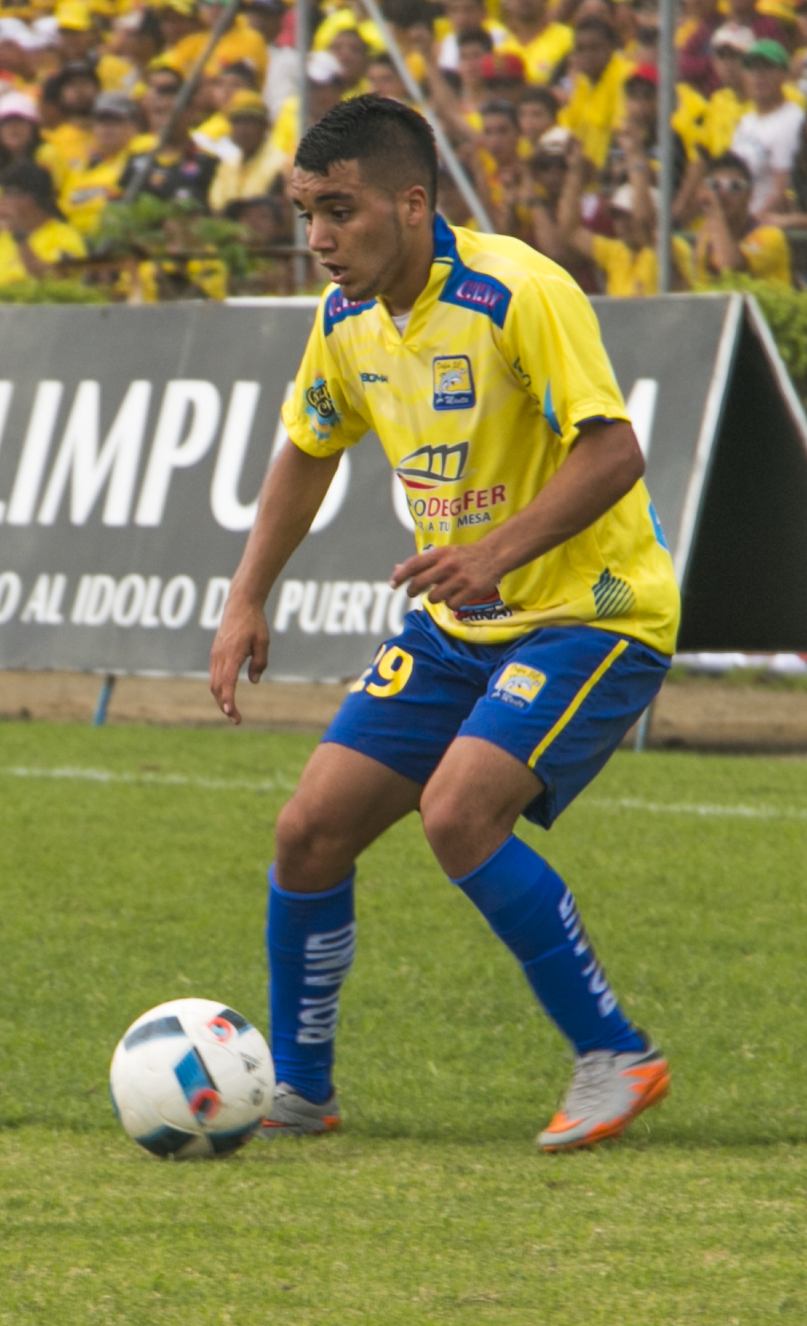 Ezequiel Vidal jugando para Delfín Sporting Club de Manta en el 2016